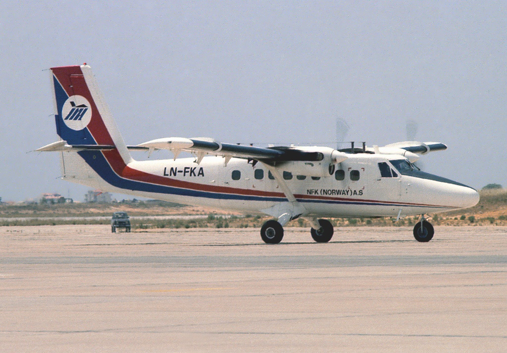 Norsk Forurensningskontroll De Havilland Canada DHC-6-310 Twin Otter LN-FKA at Faro Airport